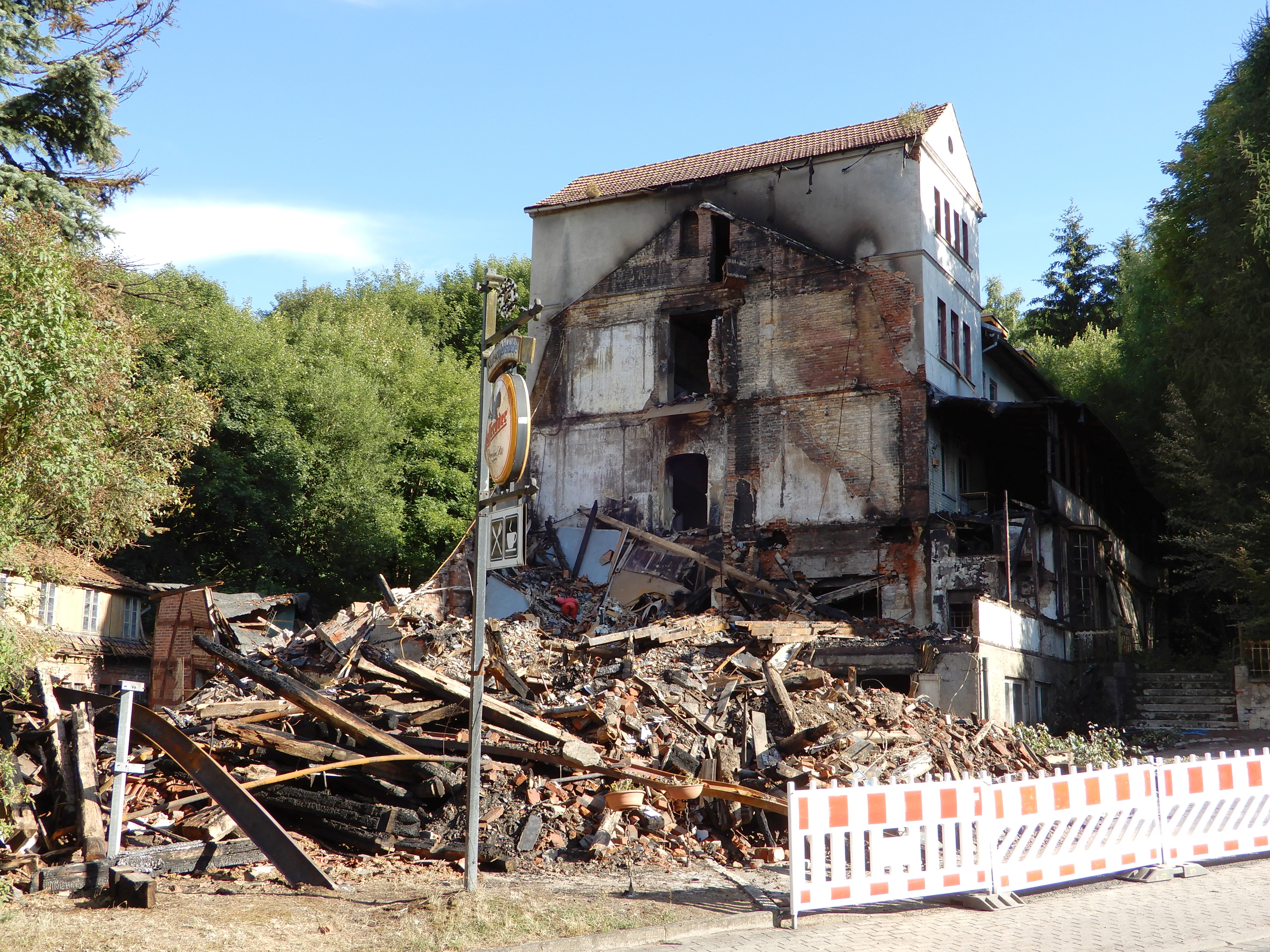 Reste der denkmalgeschützten Kutscherstube, die am 2. Juli 2018 abbrannte.